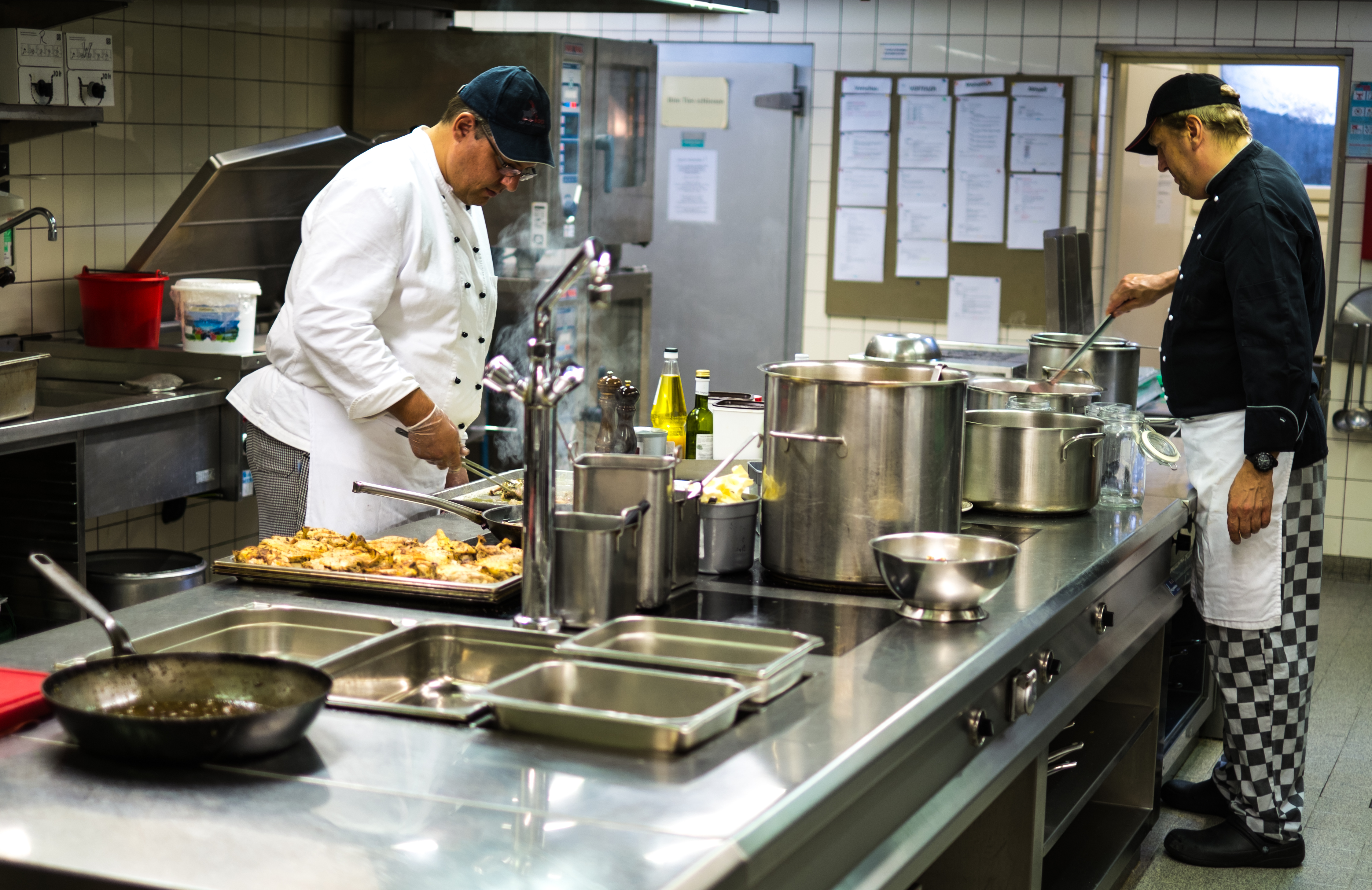 Sporthotel Pontresina, Küche